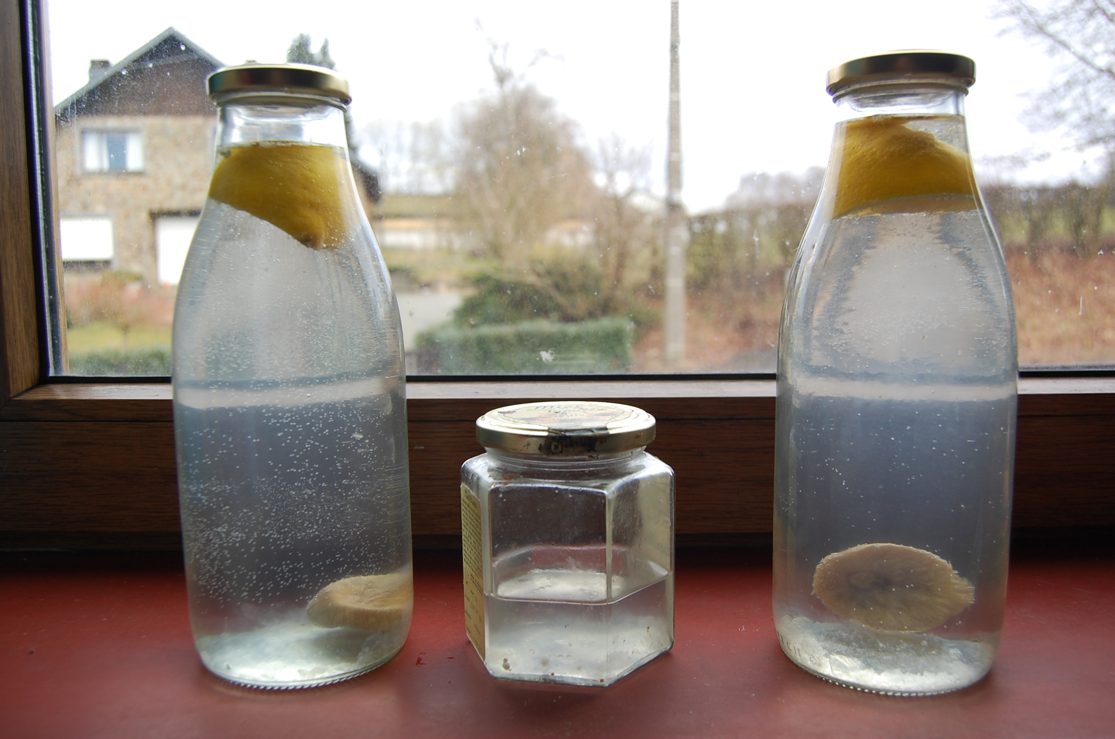 Walon: Siminces (å mitan) avou deus bocås di kefir a l' aiwe djusse aprestés (li figue est co å fond)